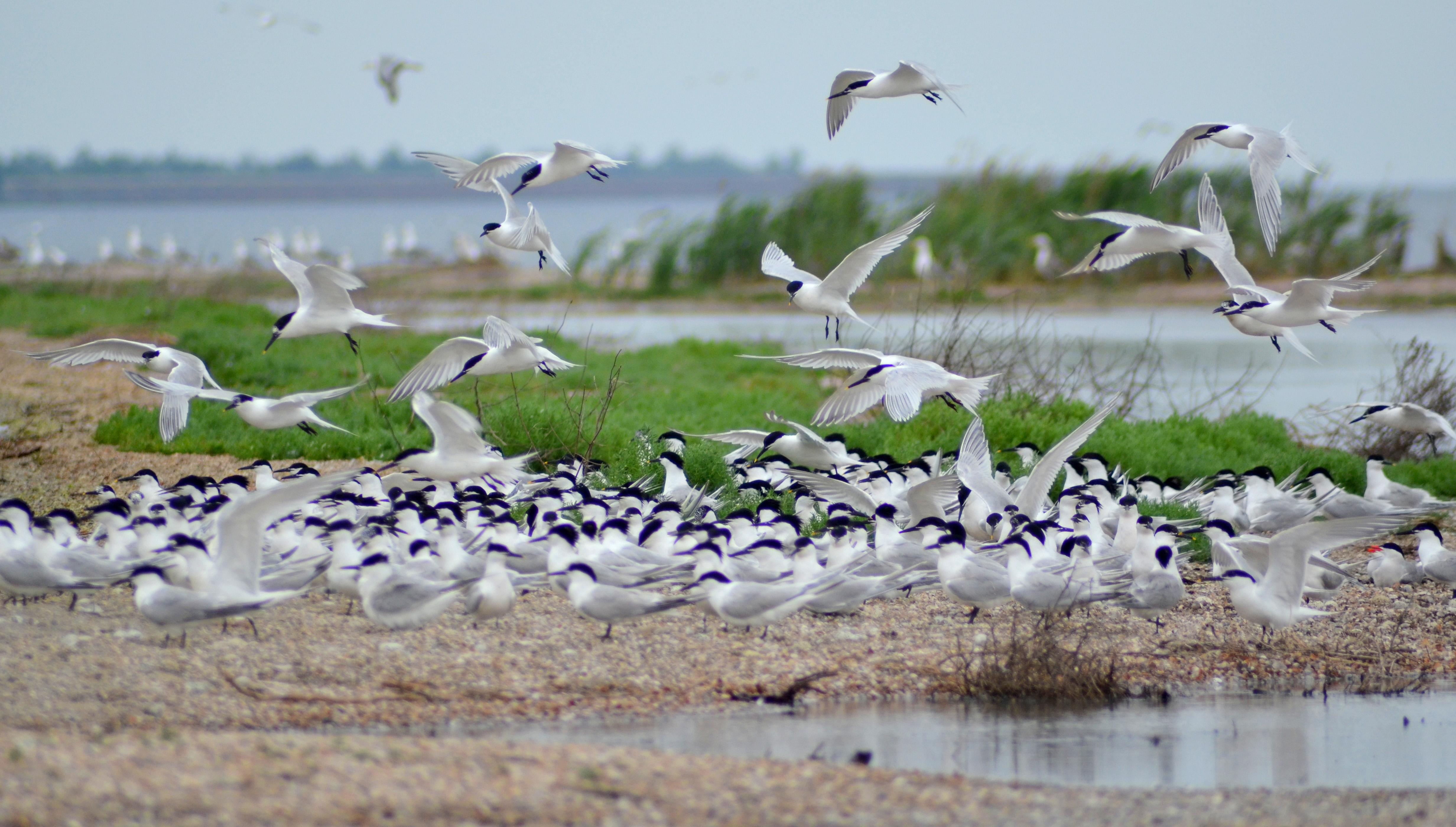 «Тузловські лимани», Татарбунарський район